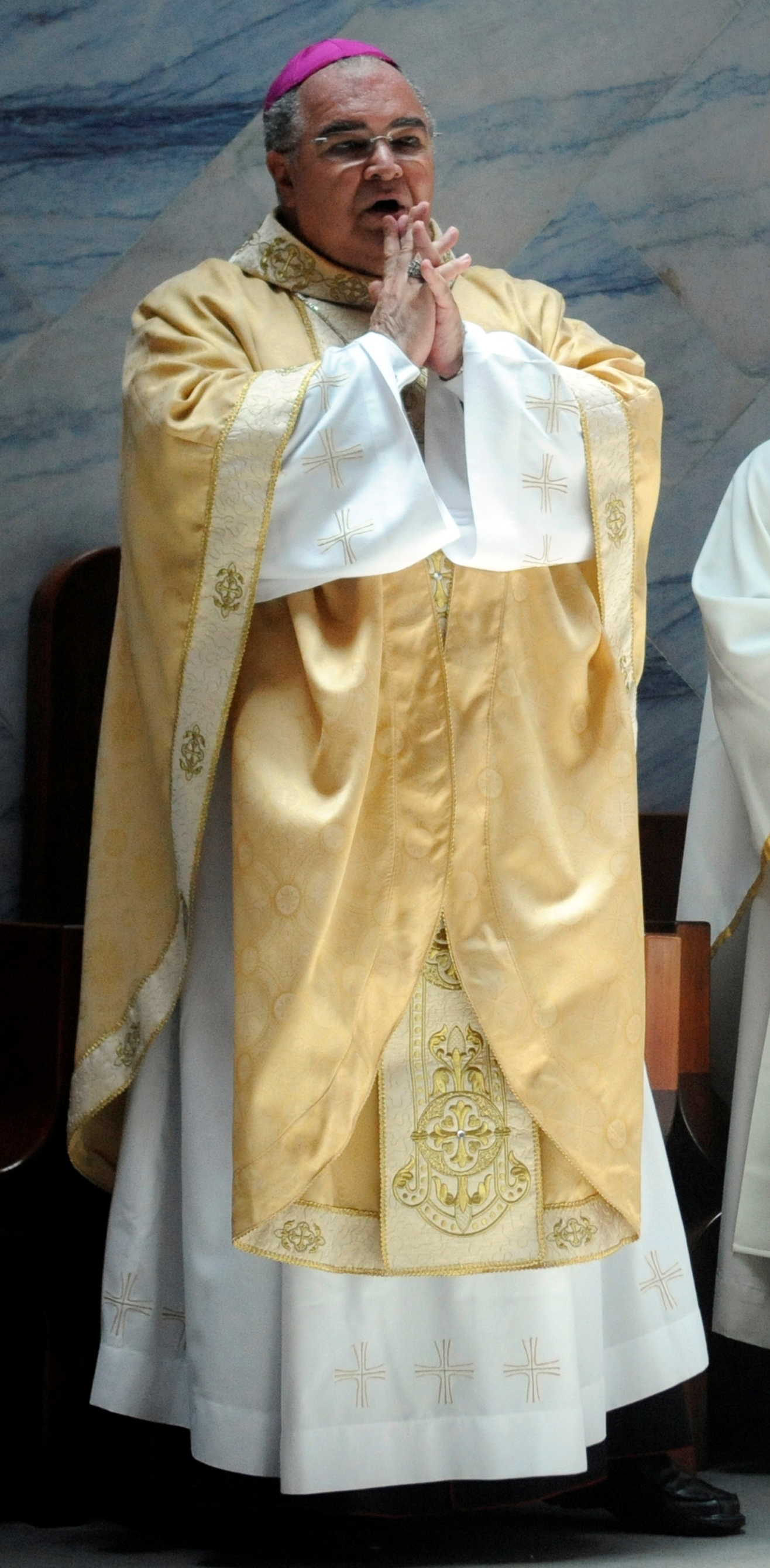 O arcebispo do Rio de Janeiro, dom Orani Tempesta disse que sua nomeação como cardeal é uma honra e agradeceu à torcida dos fieis. A promoção foi anunciada nessa manhã, no Vaticano, pelo papa Francisco